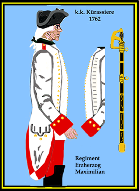 Österreichisches Kürassier-Regiment „Erzherzog Maximilian“ (Aus: L.& F. Funcken - „L'Uniforme et les Armes des soldats de la guerre en dentelle II“) Castermann (Tournai 1976)